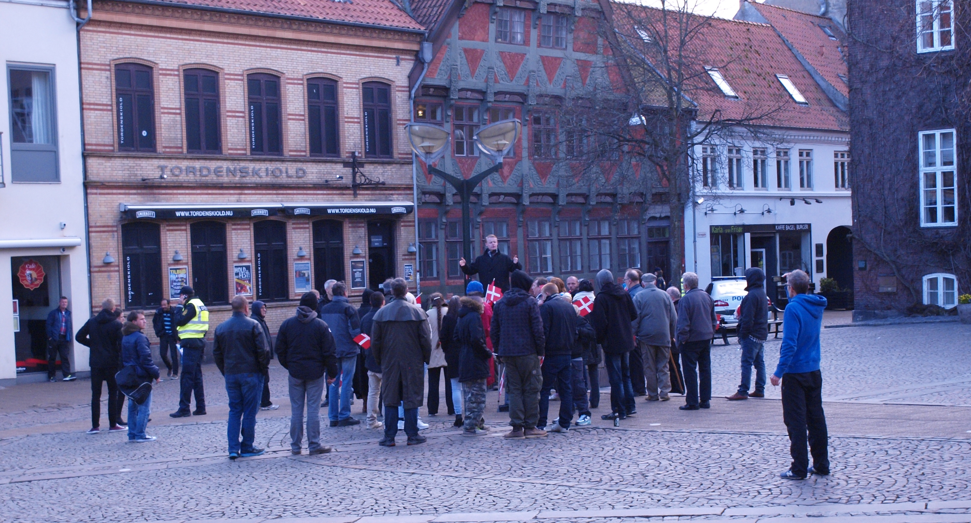 SIAD demonstration - 13. april 2015 - demonstration i Kolding imod islamisering af Danmark